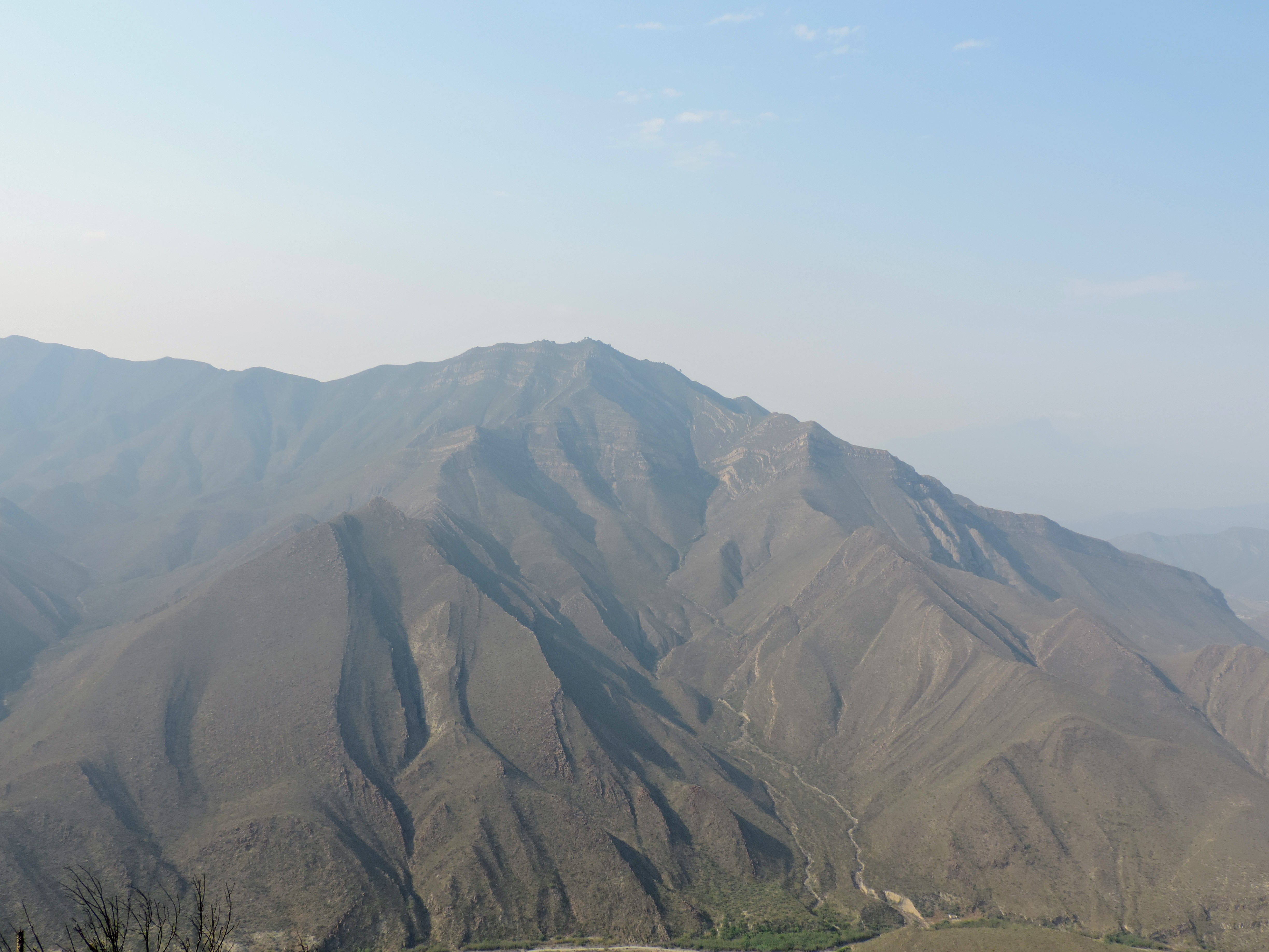 Cerro La Mota Grande desde Sierra Corral de los Bandidos